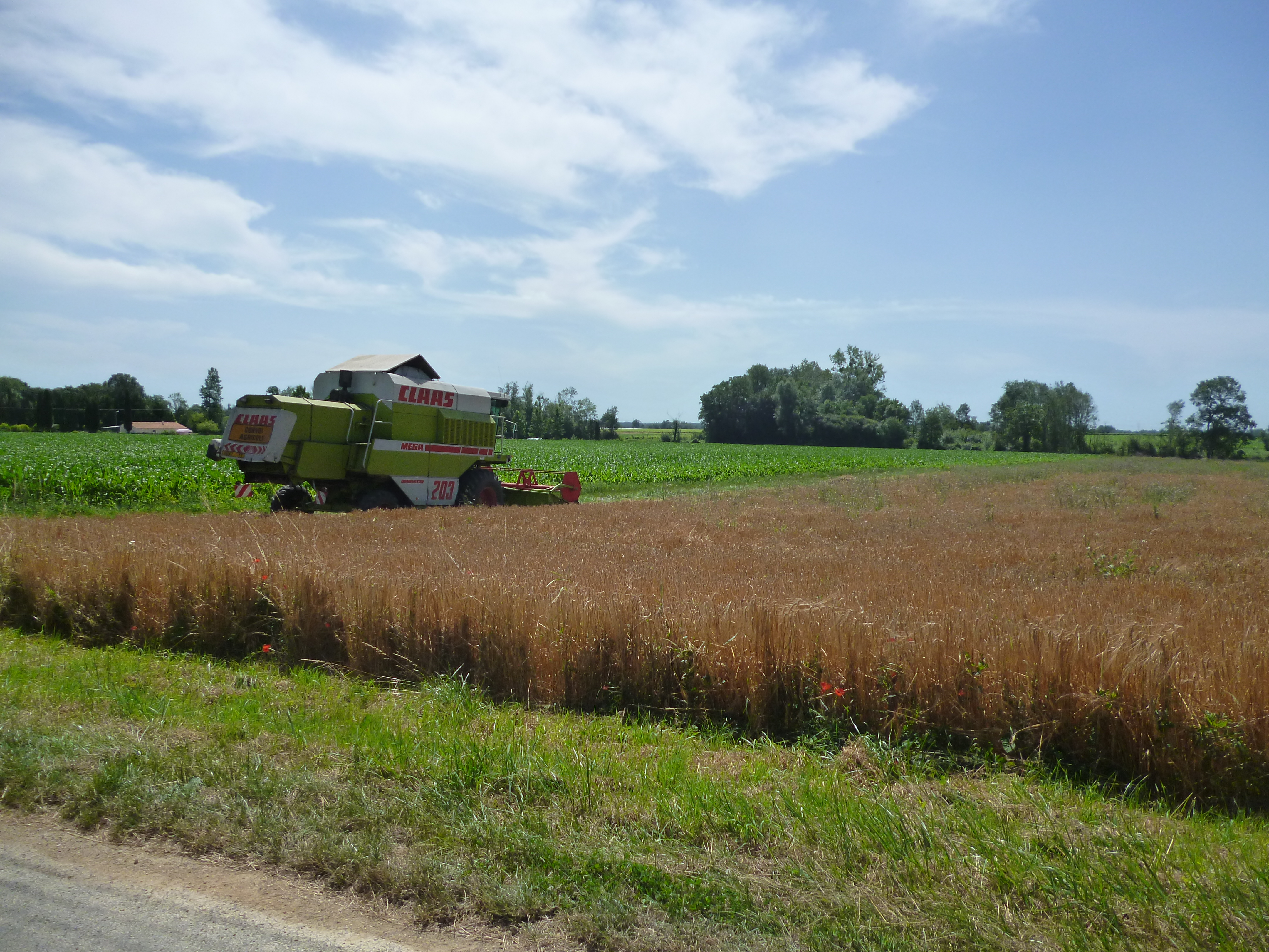 Moissonneuse-batteuse entre deux champs de céréales, à Migron.